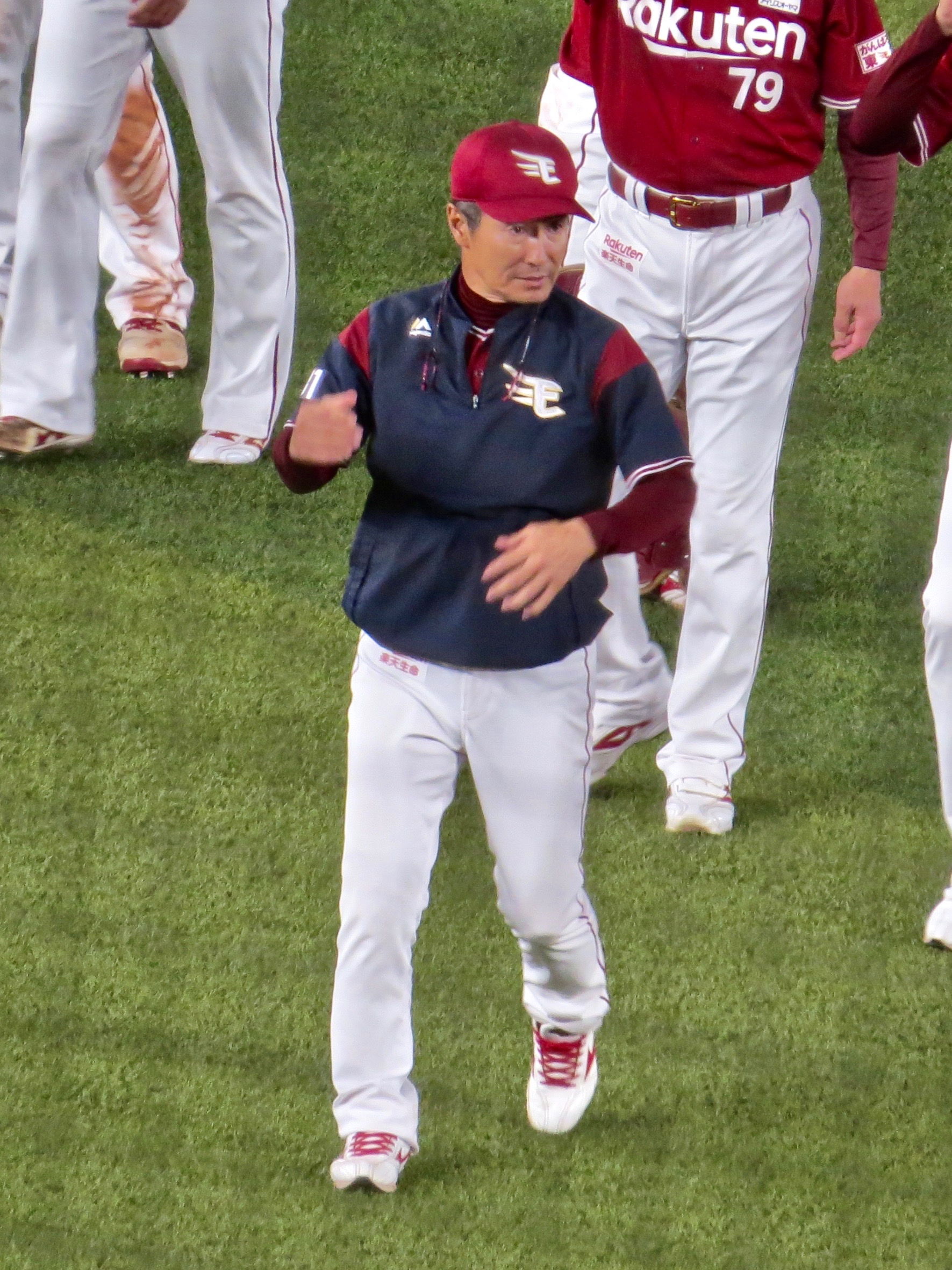 東北楽天ゴールデンイーグルスのコーチ「金森栄治」。ZOZOマリンスタジアムにて。